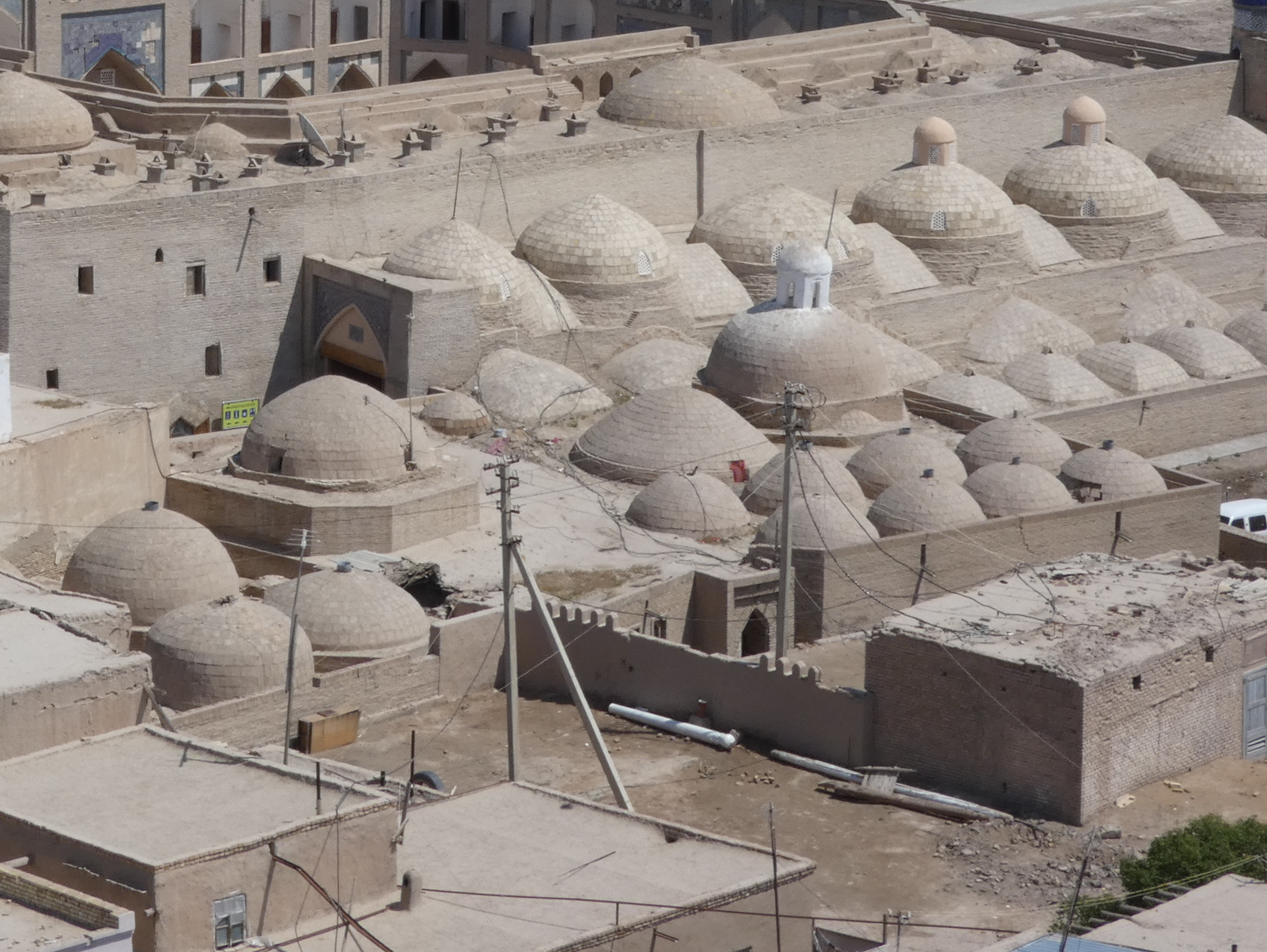 Badehaus Anush Khan, Chiwa, vom Minarett der Dschuma Moschee